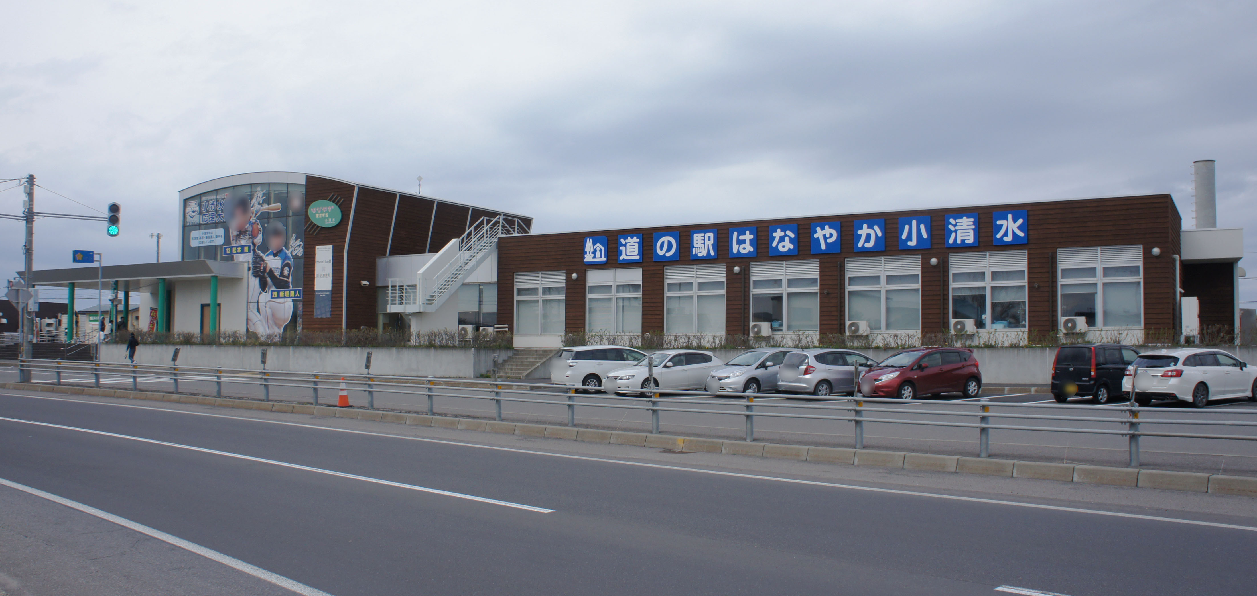 JR釧網本線・浜小清水駅の駅舎（道の駅「はなやか（葉菜野花）小清水」と一体化されている）